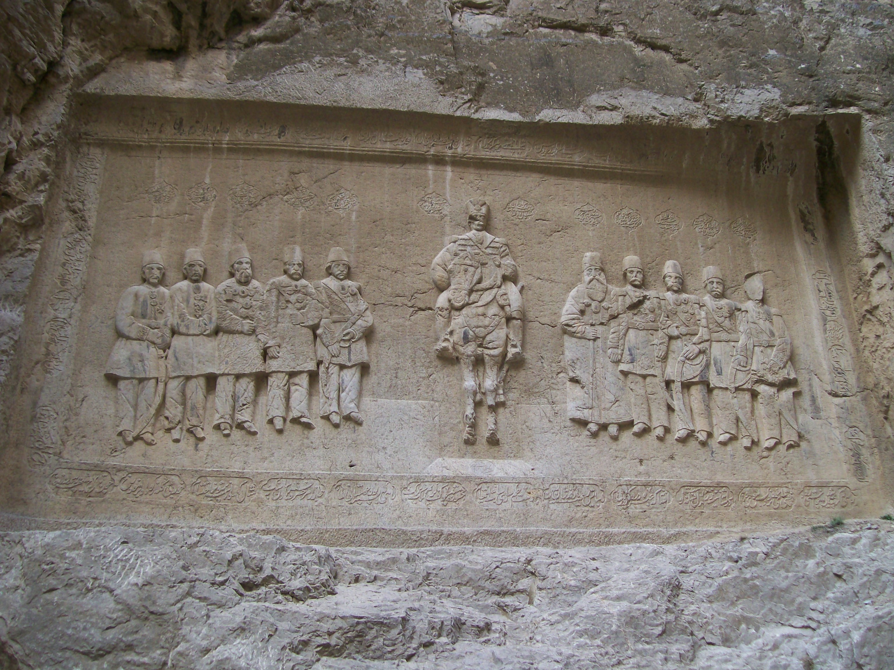 شکل شاه